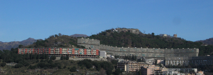 Il quartiere del Biscione (Genova) visto dalle mura di San Bernardino. Foto scattata da me: don Paolo - dimmi che te ne pare 14:54, Gen 20, 2005 (UTC) Biscione